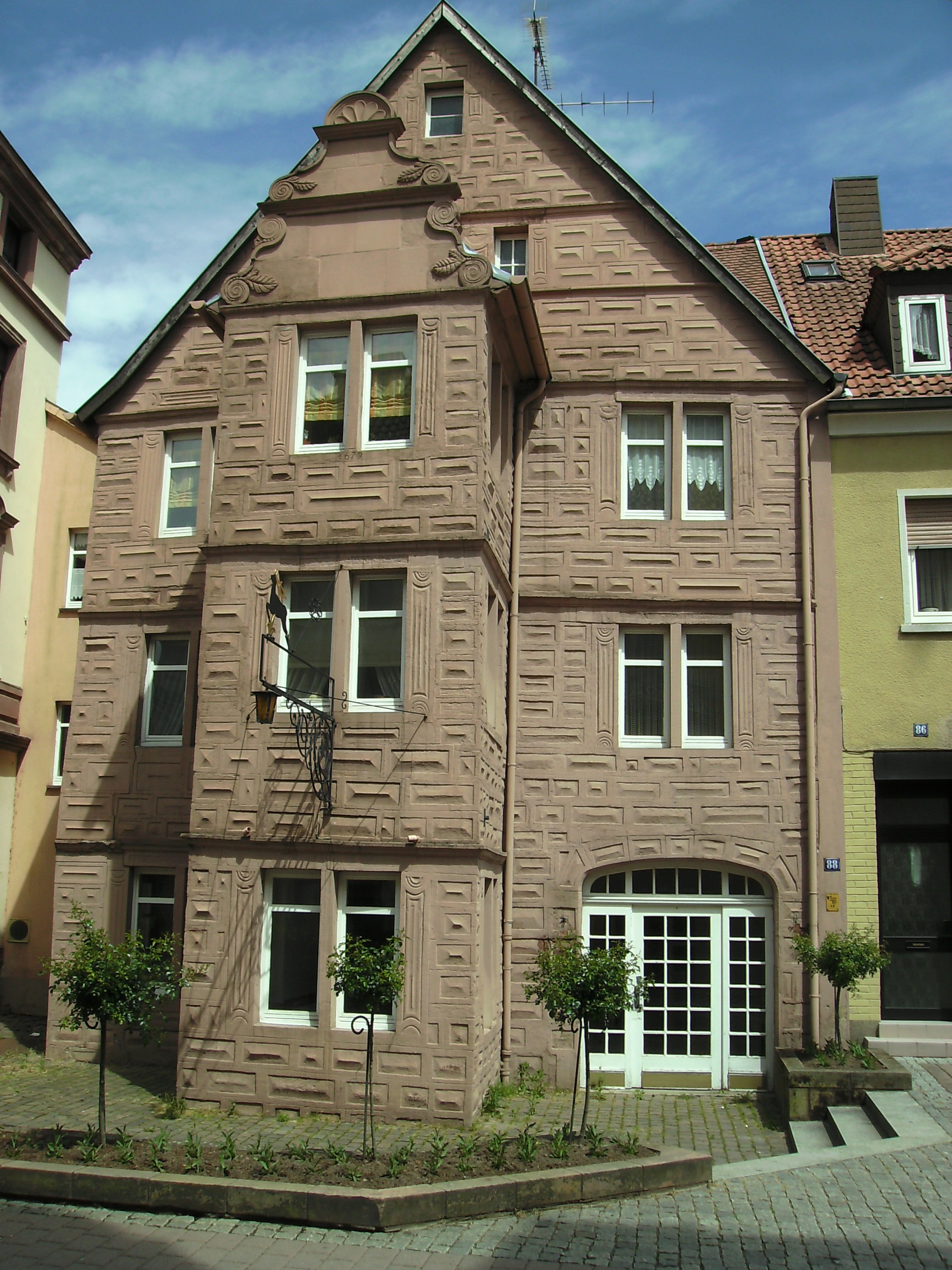 Fussgängerzone: Bürgerhaus (1679)